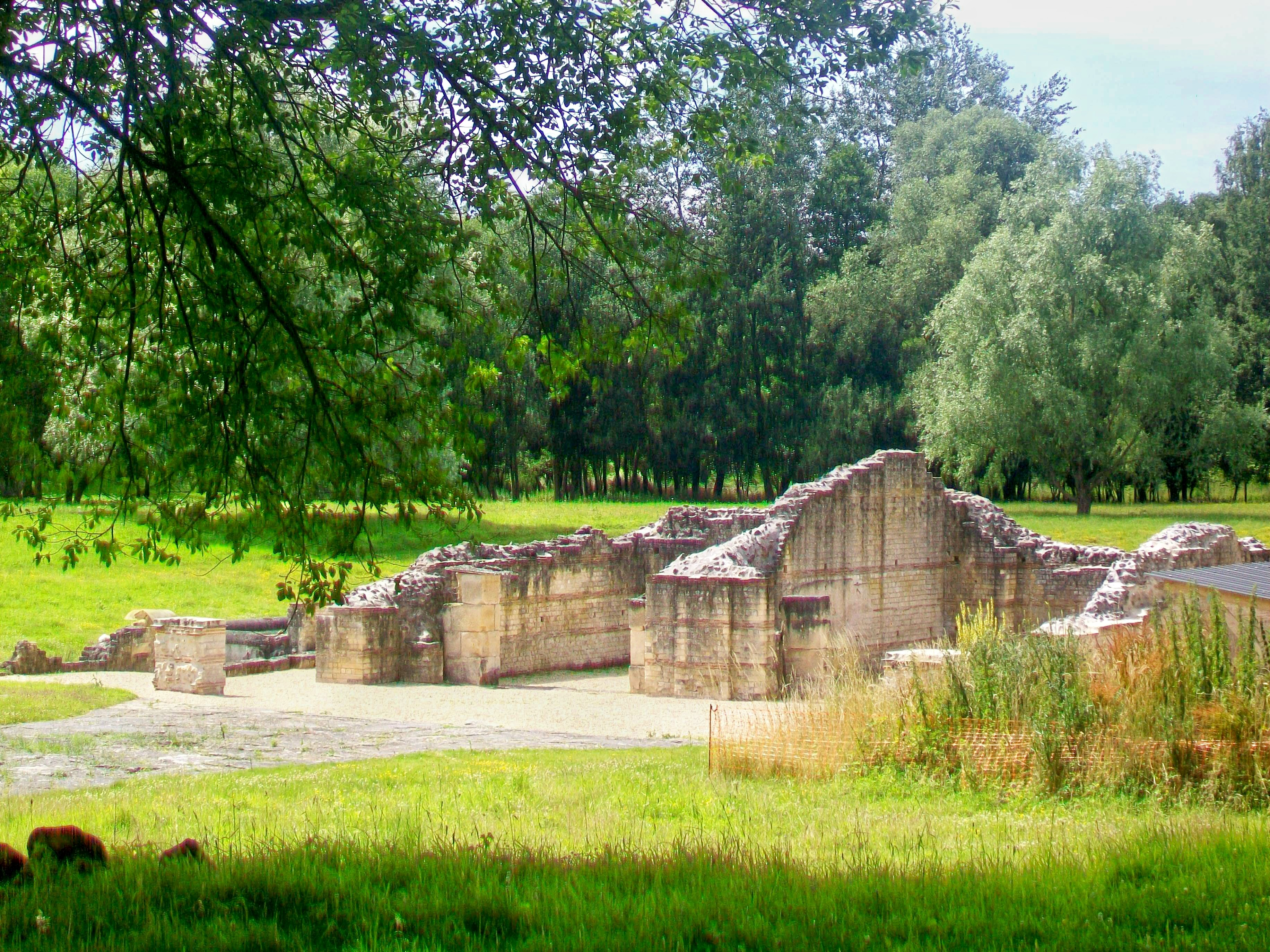 Vestiges archéologiques d'un temple du IIe siècle, près de l'amphithéâtre.